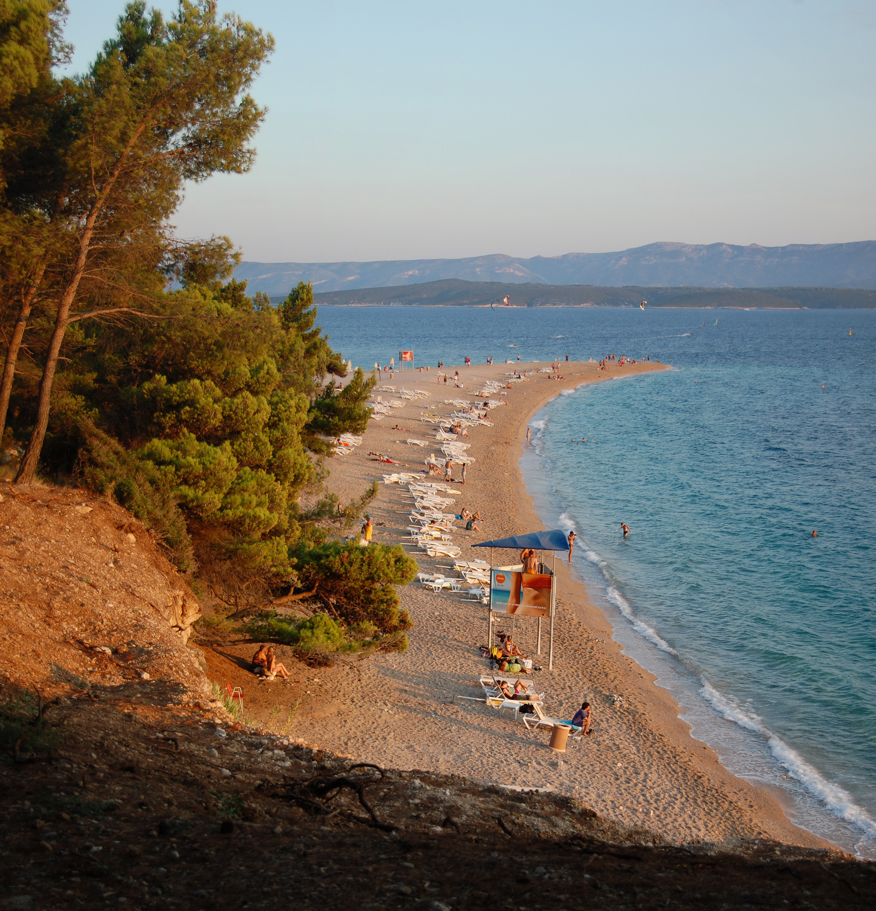 Veduta della spiaggia di Zlatni Rat al tramonto